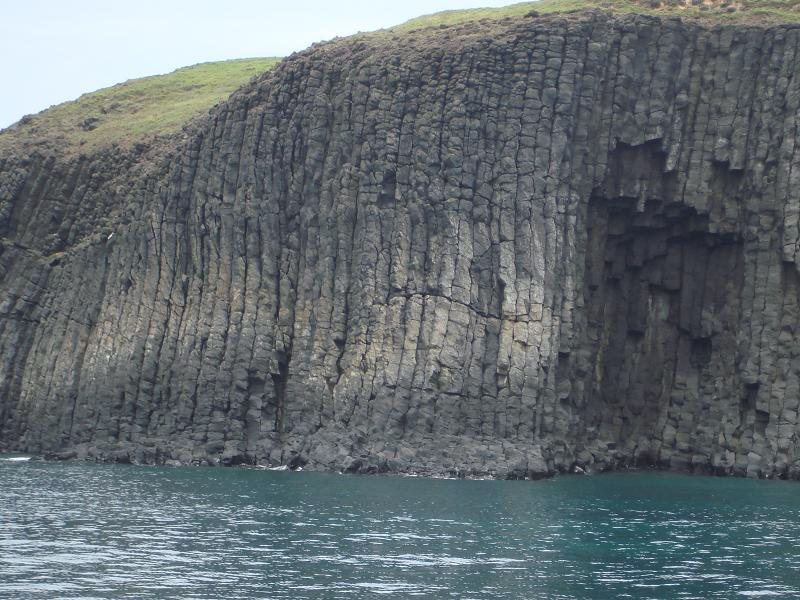 中文（台灣）: 澎湖縣鳥嶼玄武岩。